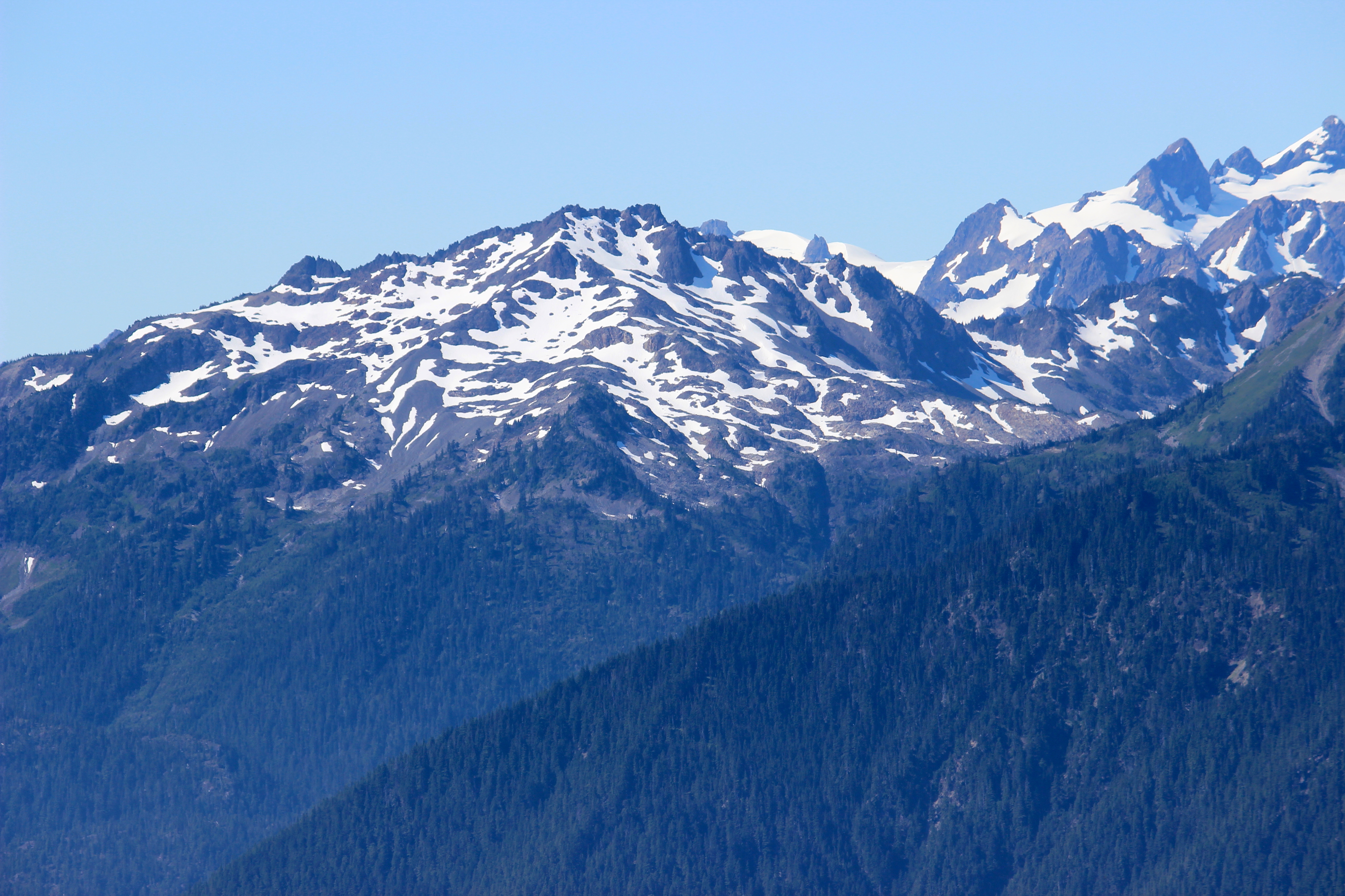 Olympic National Park. Hurricane Ridge.